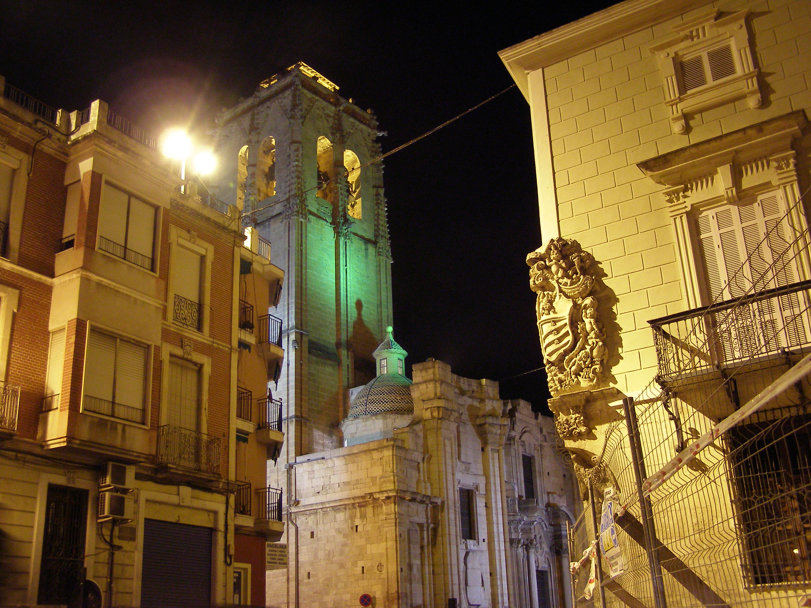 Innenstadt von Orihuela Spanien